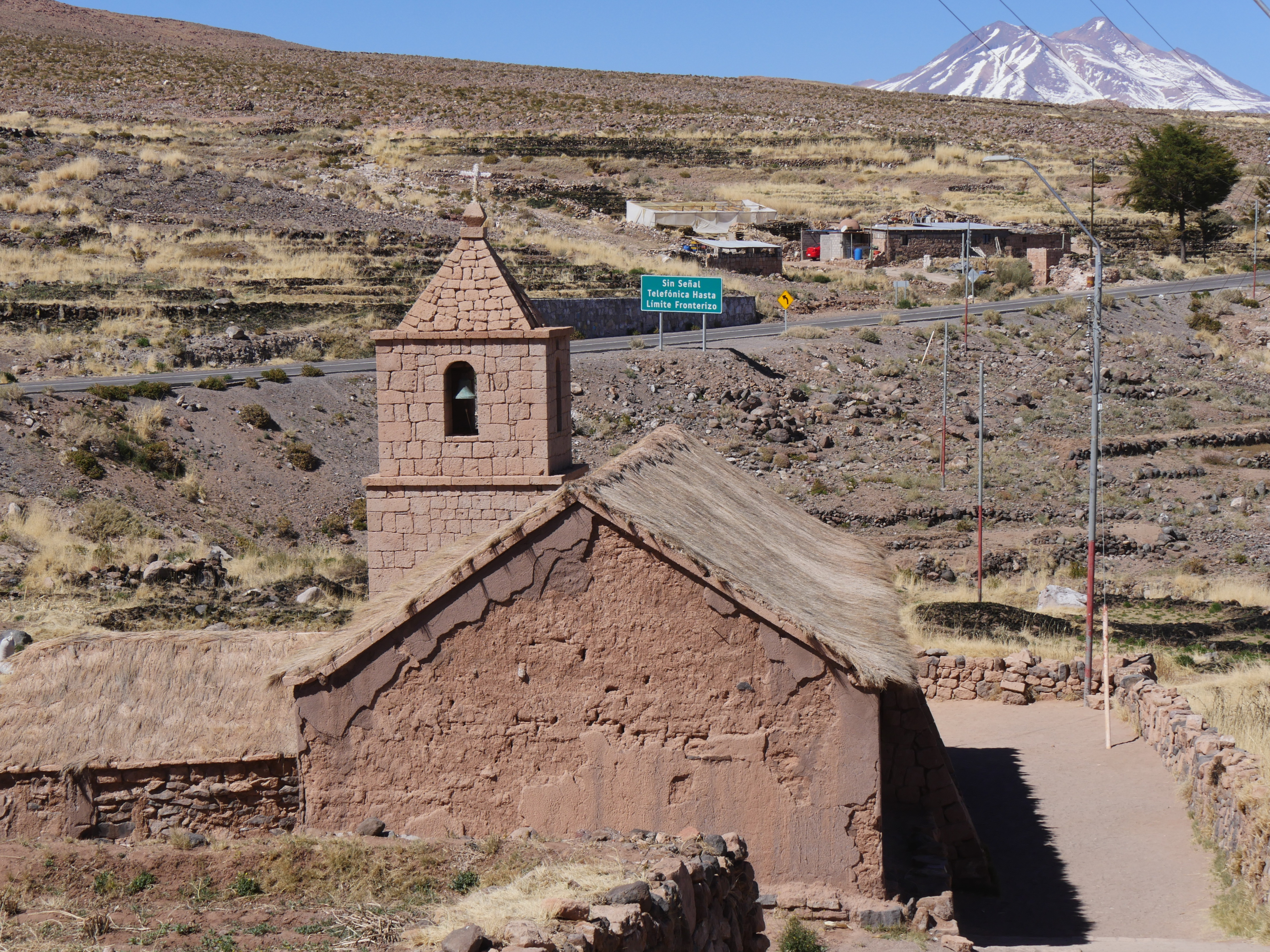 Iglesia de Socaire